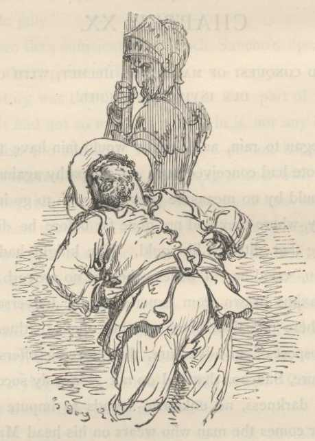 Sancho Pança ri-se do engano